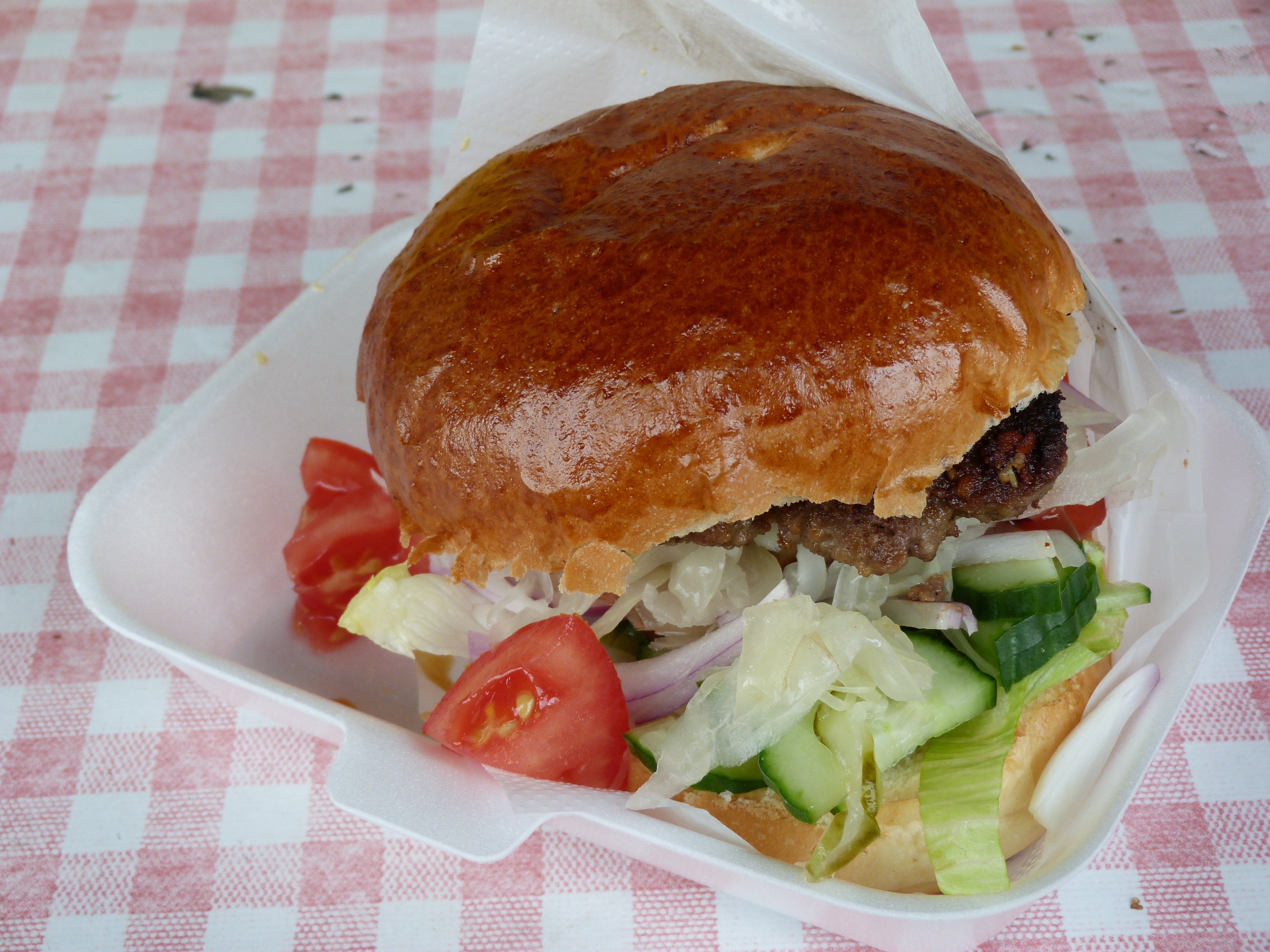 Retro Hamburger